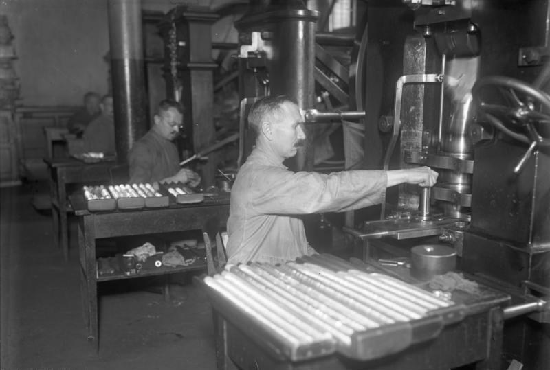 Ein Blick in die Staatliche Münze in Berlin! Das Prägen des Geldes in der Prägmaschine. Vorn die langen Reihen des zu prägenden Silbergeldes.